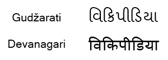 Sana "Wikipedia" gudžaratilaisilla kirjaimilla ja devanagarilla.